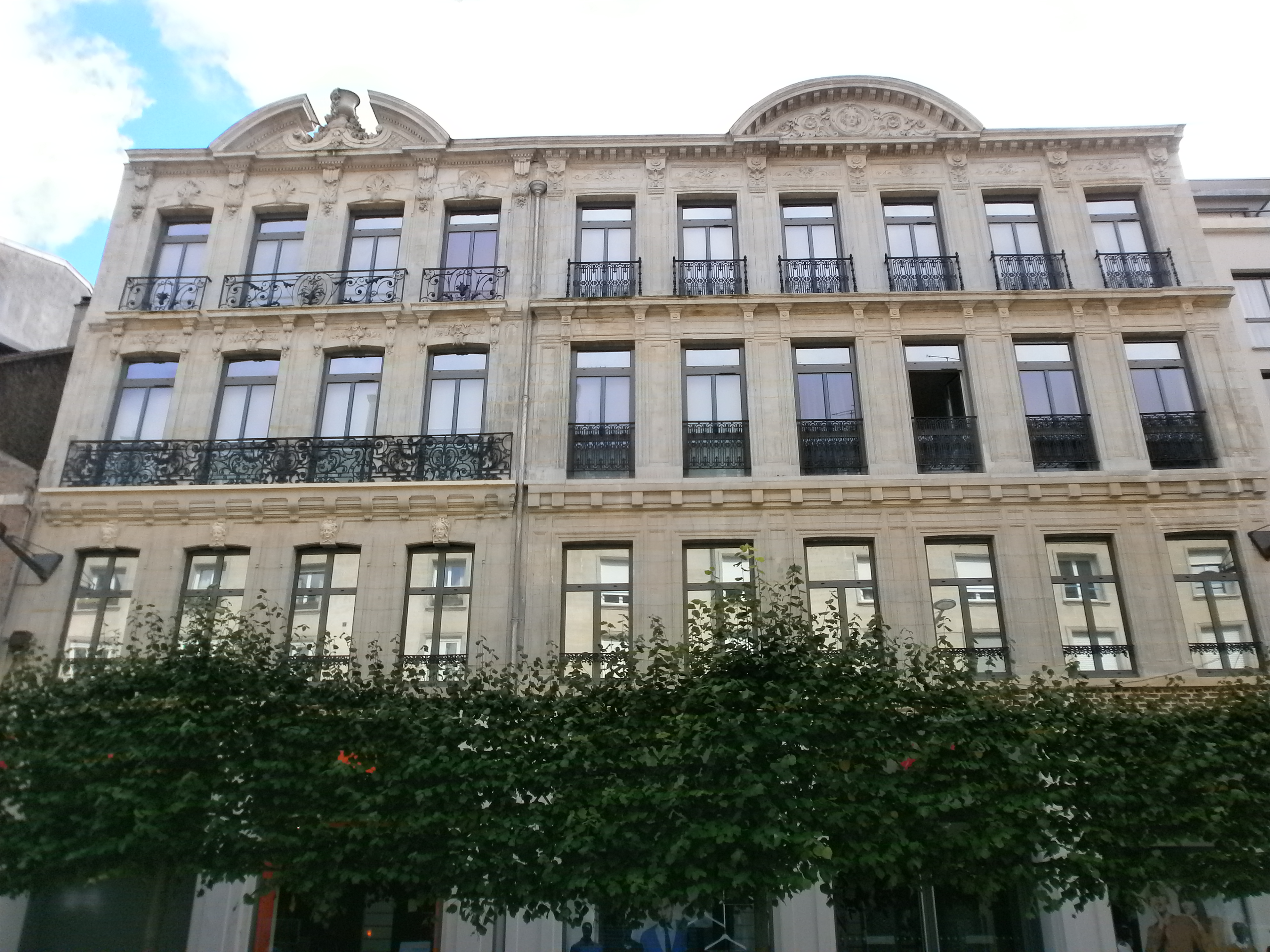 Amiens - Ancienne imprimerie Yvert, 16-18-20 rue des Trois-Cailloux .